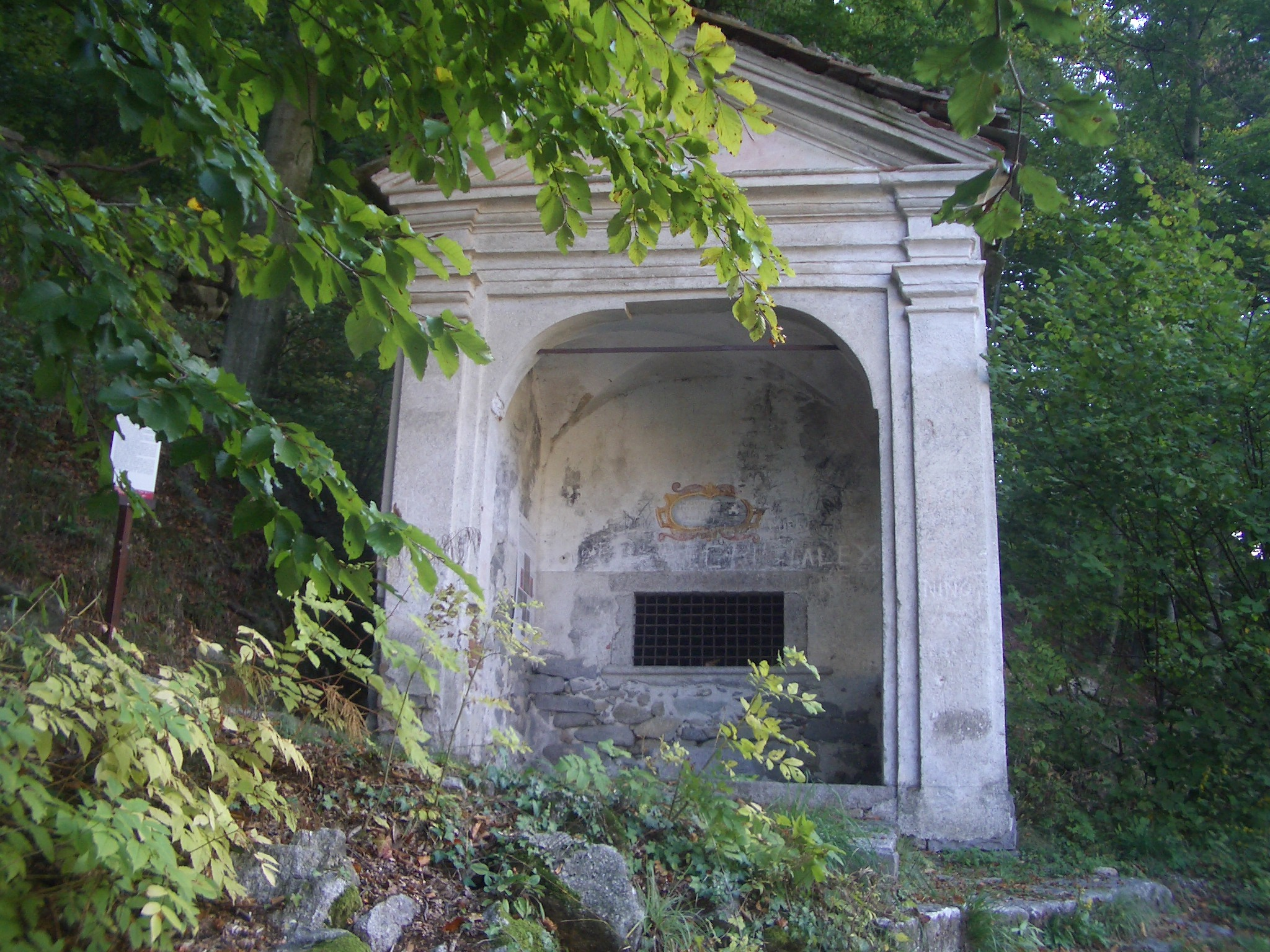 Sacro Monte di San Giovanni d'Andorno, Chapel I, Campiglia Cervo (Biella), Italy